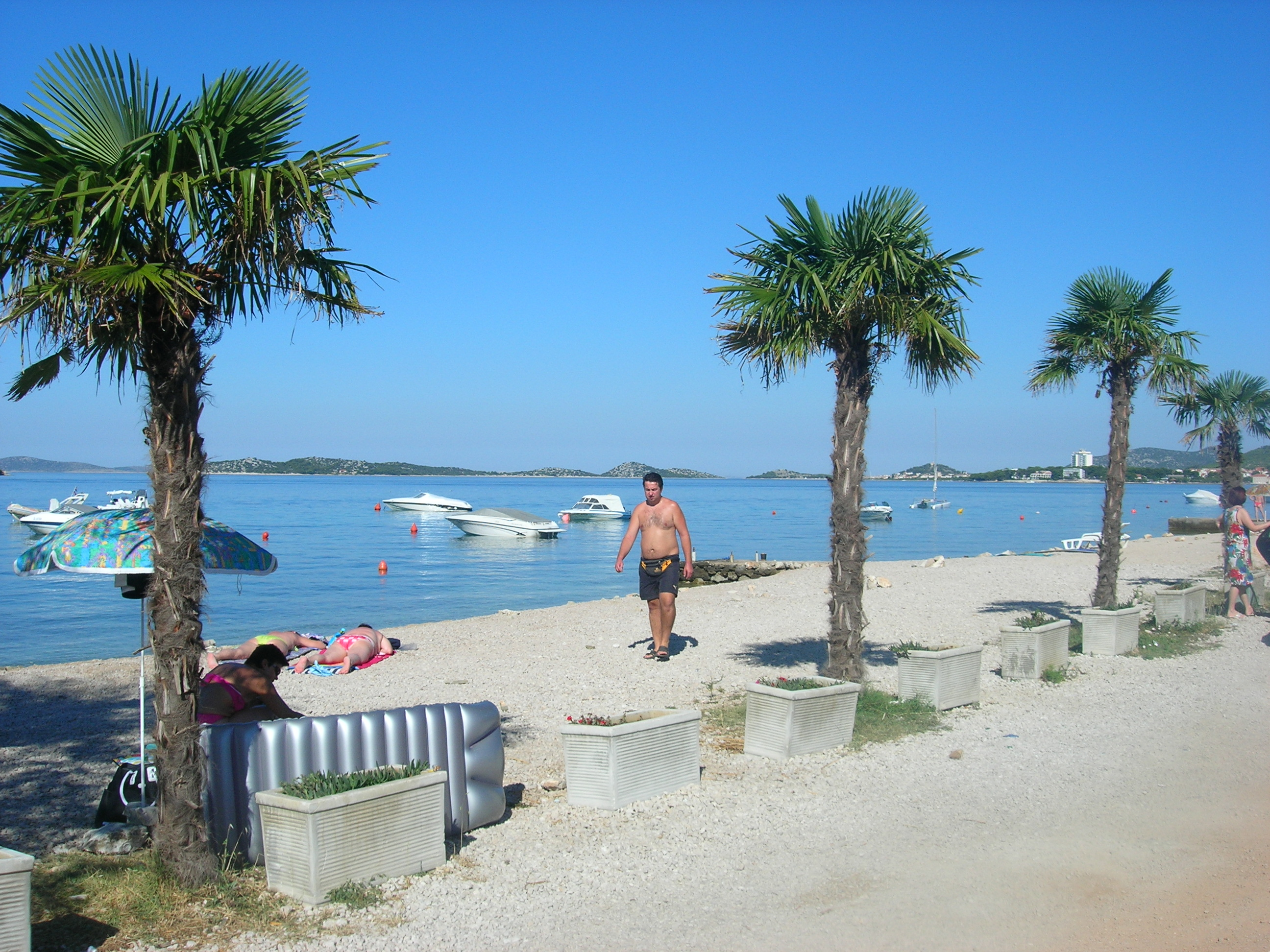 Monument (WW2) in Vodice, Croatia